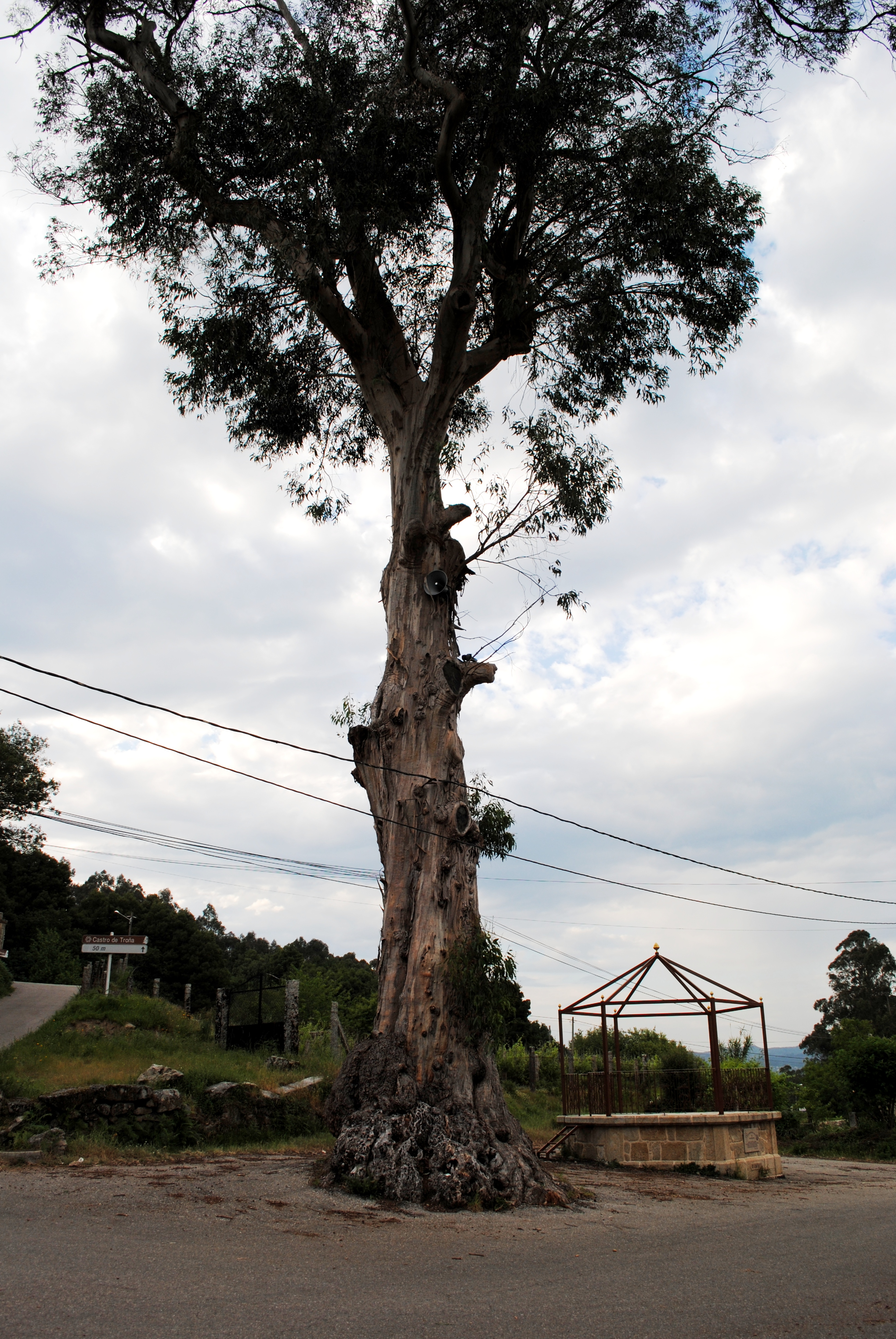 Eucalipto en Vilasobroso, Mondariz.